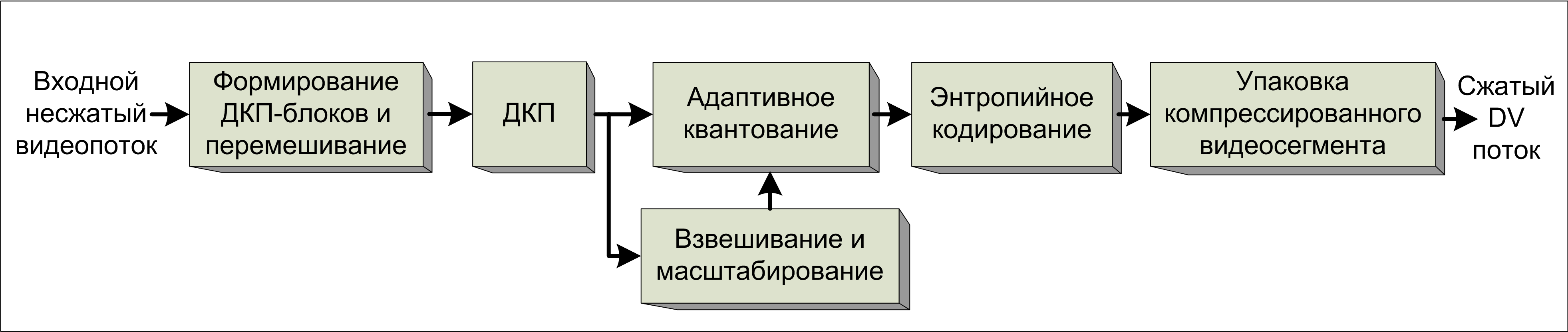 Схема DV компрессии